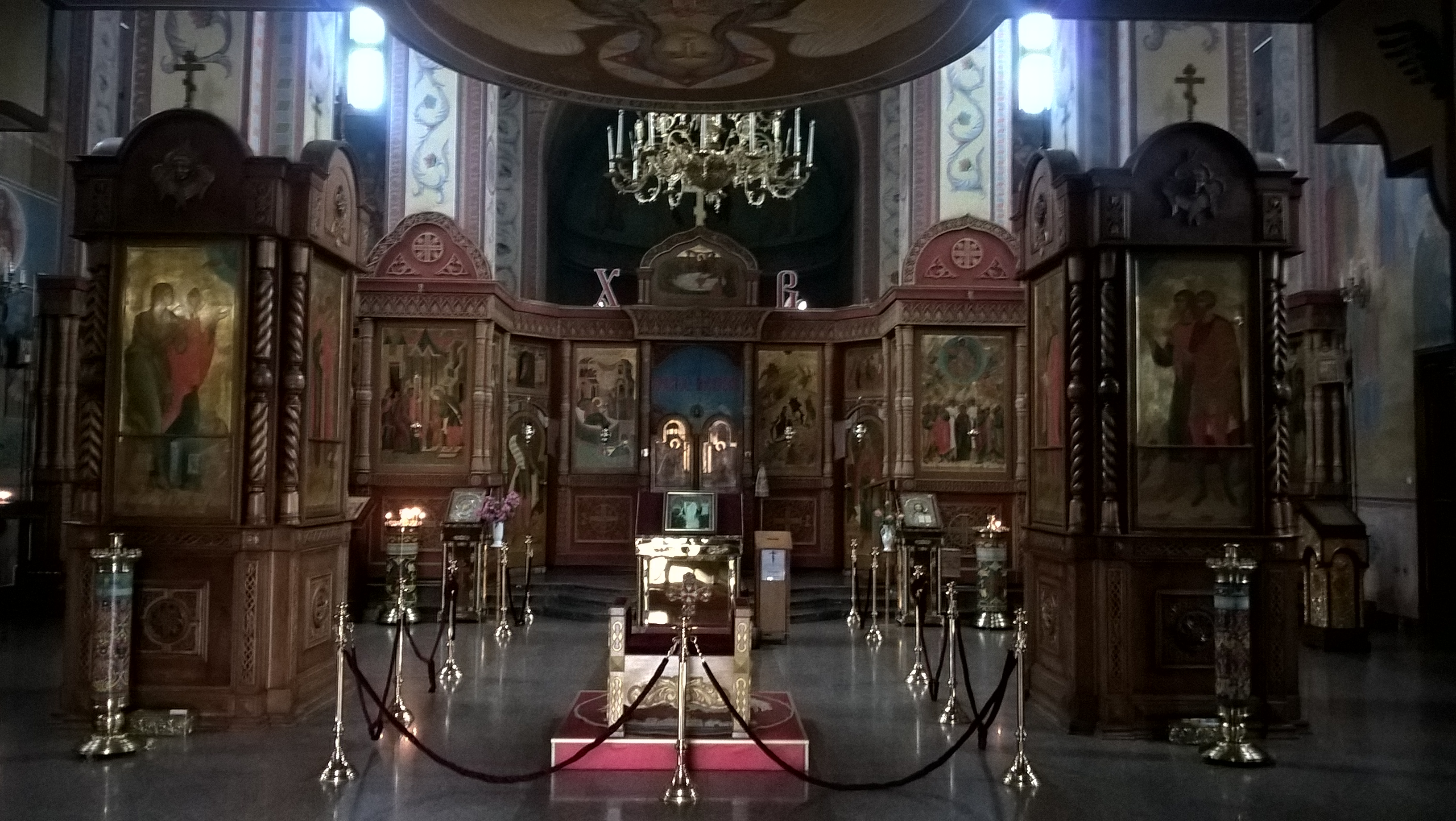 Wnętrze soboru Narodzenia Pańskiego w Tyraspolu